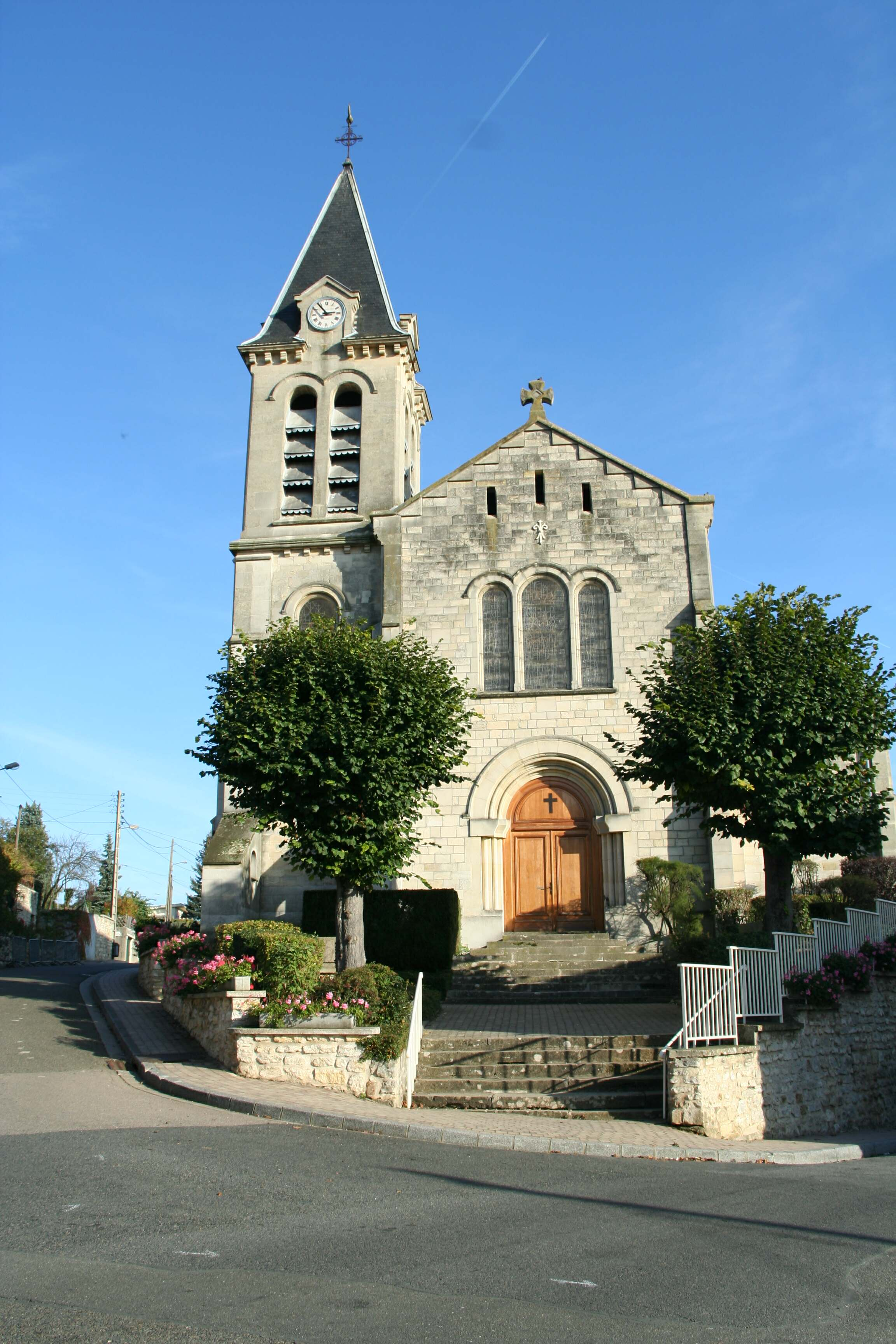 Église de Gargenville - Yvelines (France)